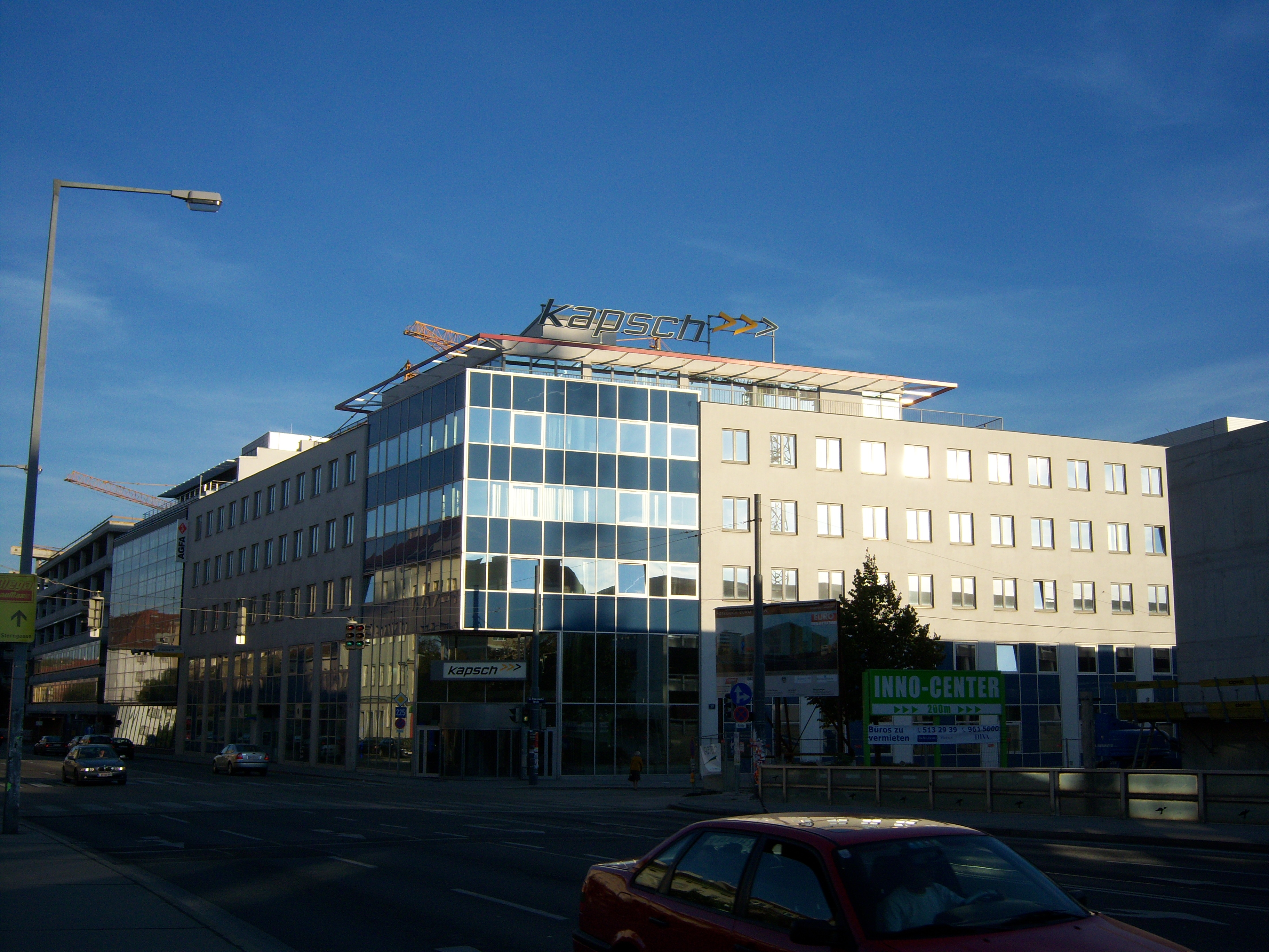 Headoffice der Kapsch BusinessCom